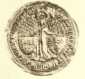 This is a scan of the historical document: Title: Die Siegel der deutschen Kaiser und Könige v. 2 (1347 - 1493)